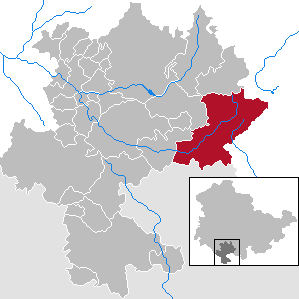 Eisfeld in Thuringia - district Hildburghausen